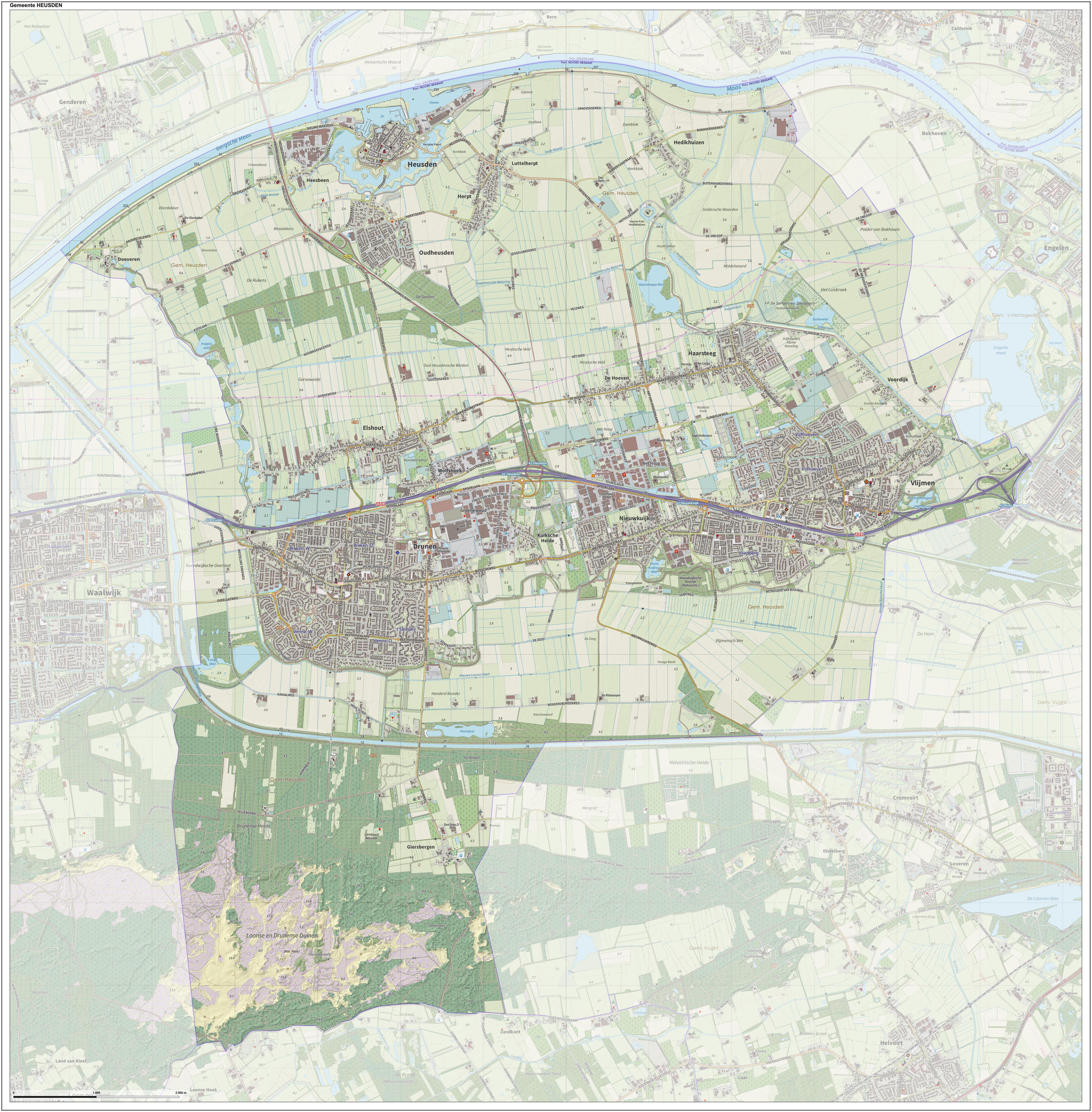 Topografische gemeentekaart. Resolutie: 400 pixels/km. Kaartbeeld samengesteld uit de open geodata van de Top10NL en Top25namen (Kadaster), Creative Commons-BY licentie. Gebouwvlakken uit open geodata BAG extract. Wegen uit de OpenStreetMap, OpenStreetMap community. Reliëfschaduw uit de Actuele Hoogtekaart AHN2. Samenstelling en kleurenschema: Jan-Willem van Aalst, met QGIS. Zie ook de Legenda.